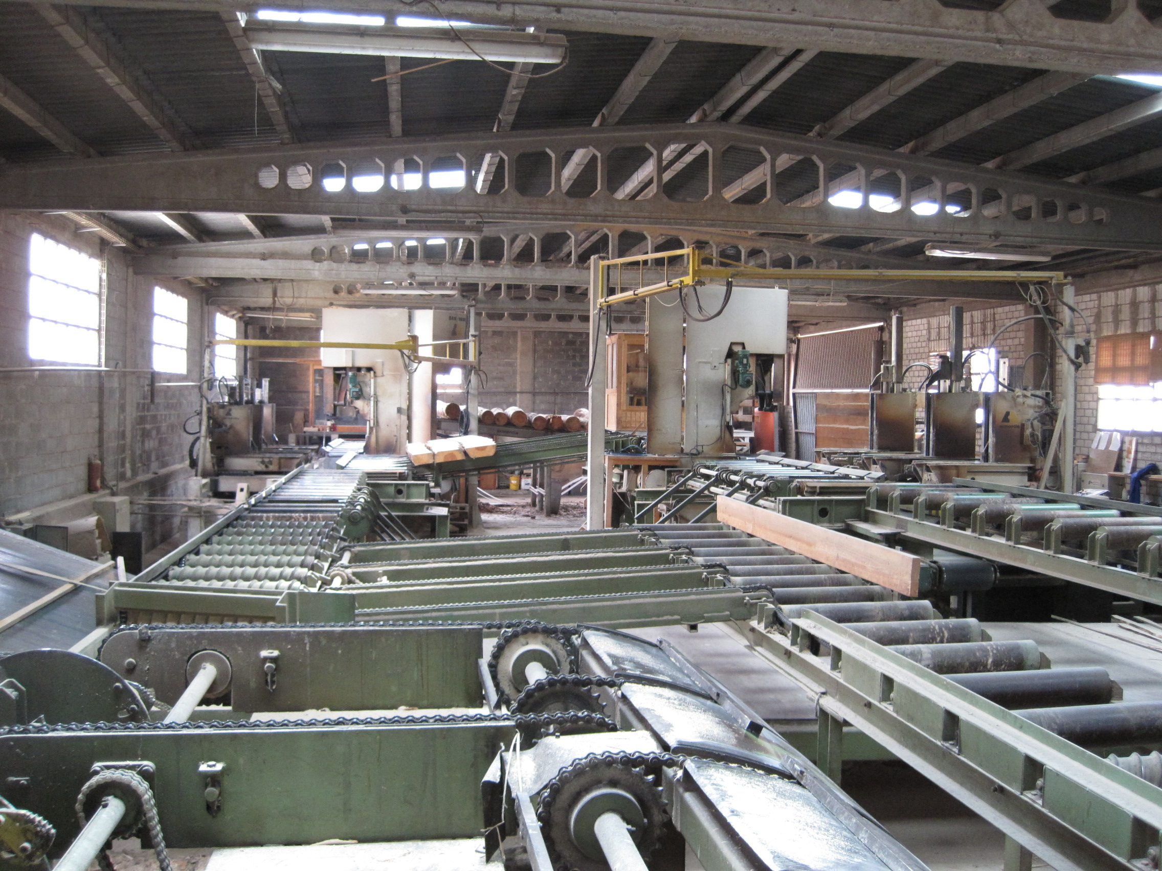 Interior de una fábrica maderera en Canicosa de la Sierra (Burgos, España).